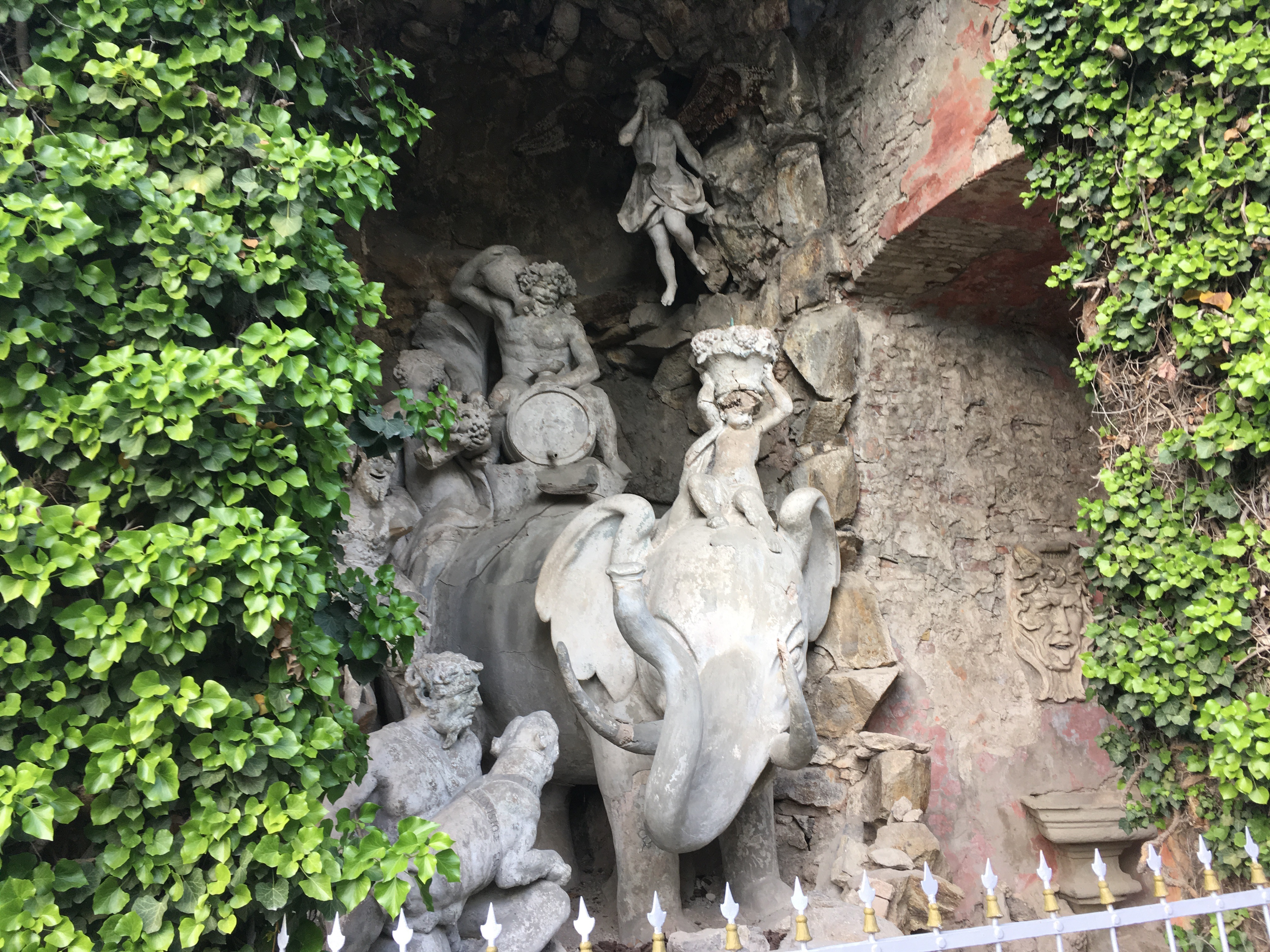 Castello del Catajo, Battaglia Terme (Padova)